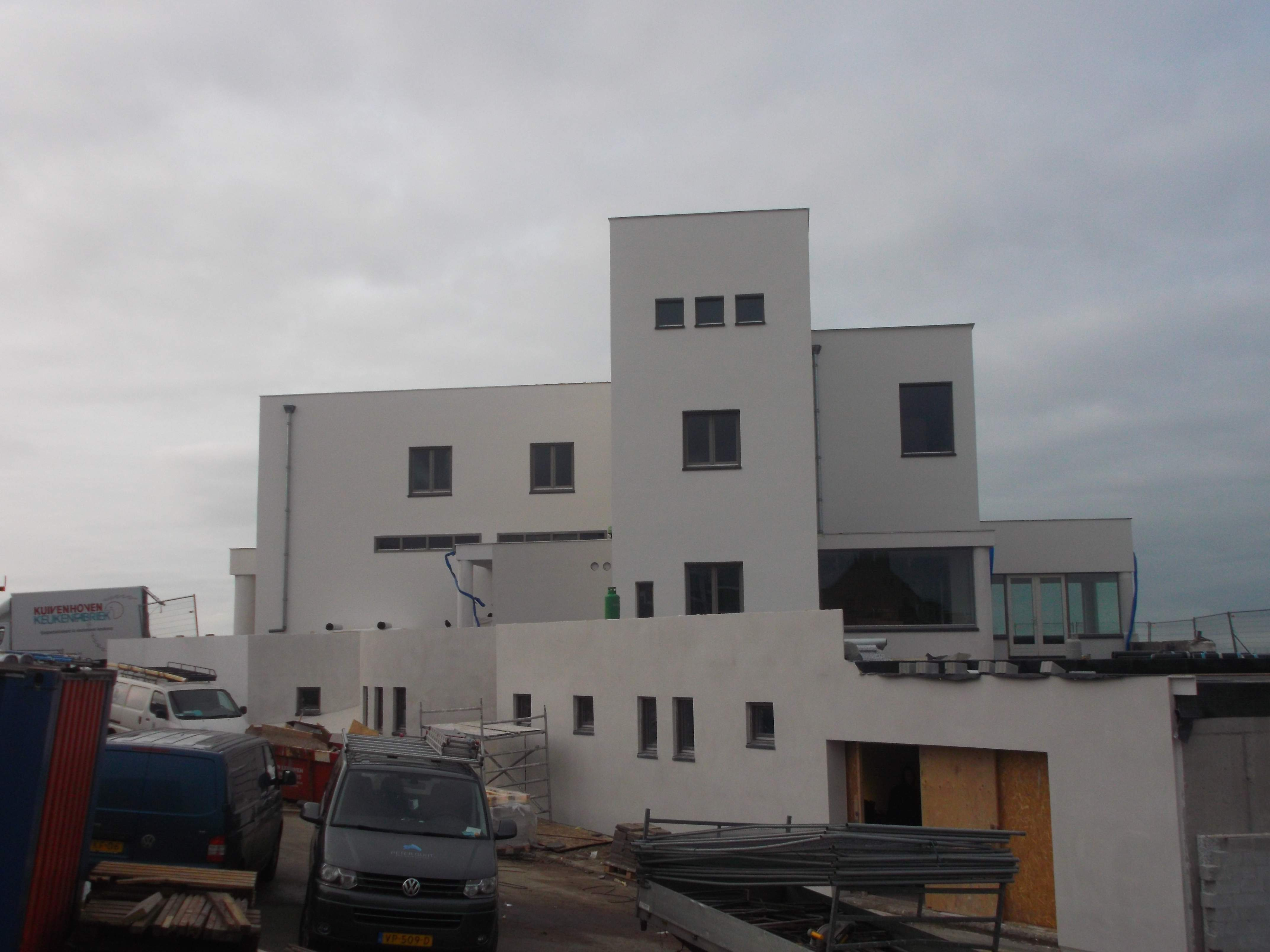 Villa Allegonda wordt in ere hersteld. Voorheen o.a. Hotel Savoy. 1 maart 2017. Vanuit oost/zuidoostelijke richting gemaakt richting zee en strand.